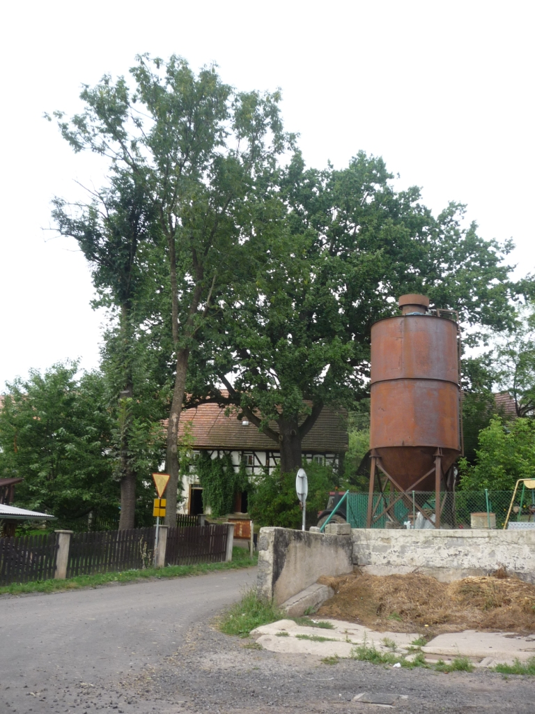 Pomnikowy dąb w Sobocie